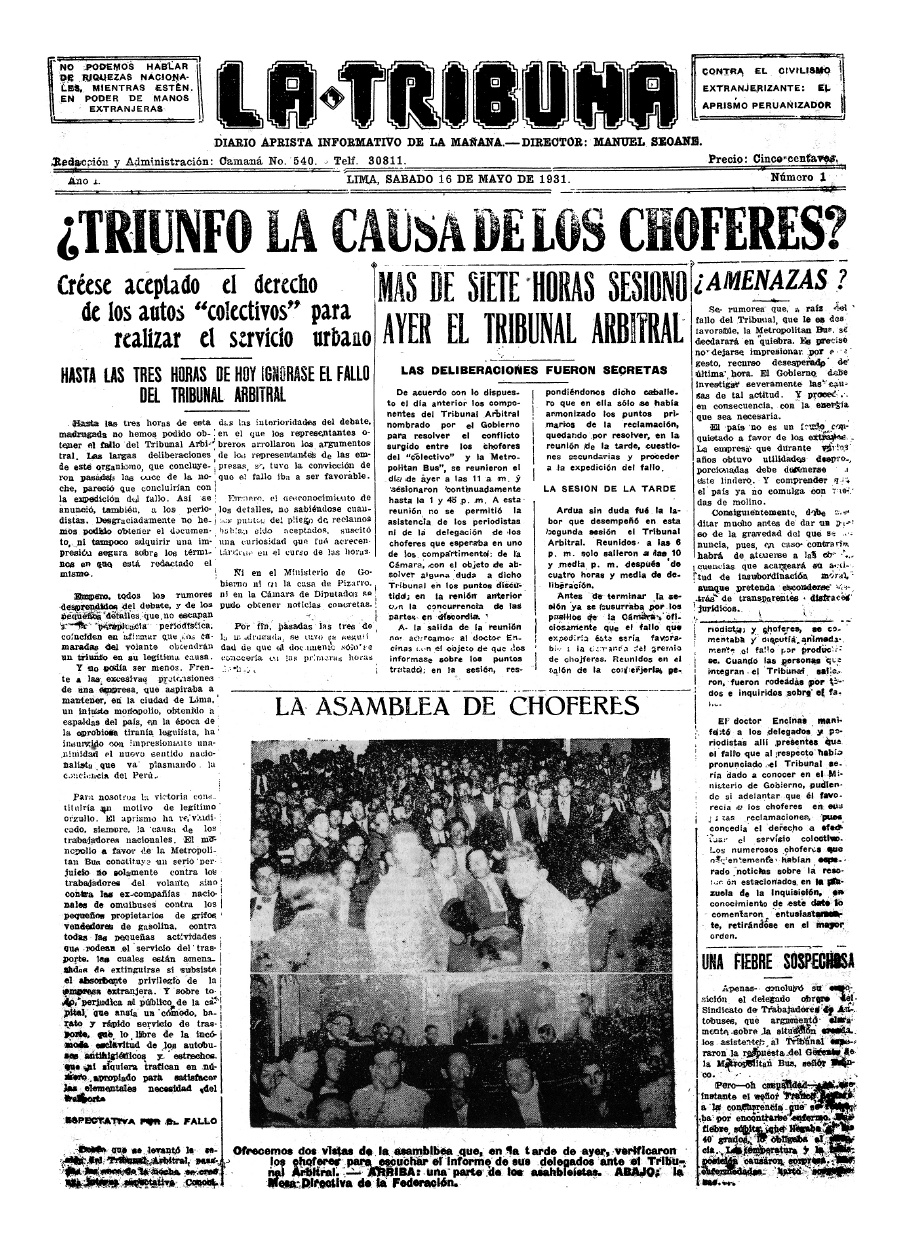 Portada de la primera edición de La Tribuna, vocero del Partido Aprista Peruano.